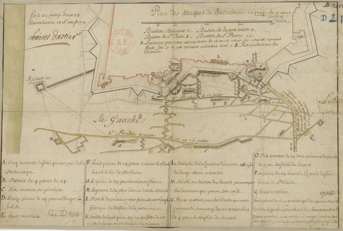 Pla de la Trinxera d'Atac realitzat el 10 d'agost de 1714 per l'enginyer Lozieres d' Astier. S'hi detallen la segona i tercera paral·lela davant els baluards del Portal Nou, Santa Clara i Llevant.